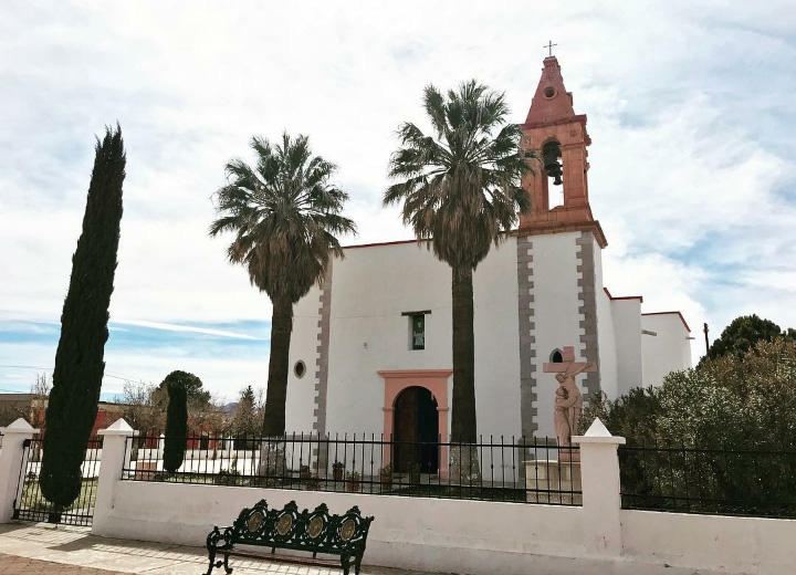 Parroque San Buenaventura, San Buenaventura, Chihuahua.